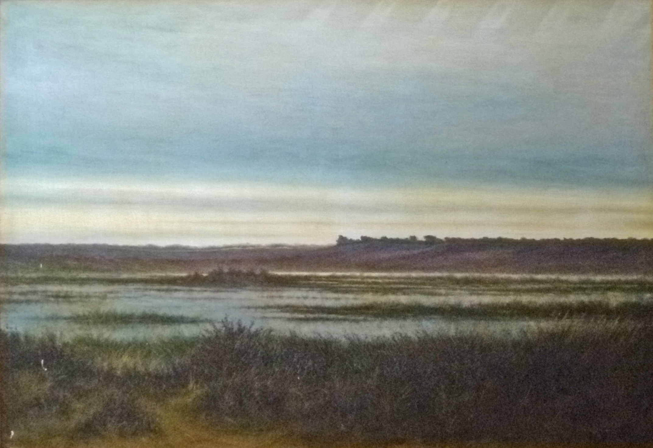 "Ven in Kalmthout", olieverf op doek (100 x 150 cm) door de Belgische kunstschilder Franz De Vadder (1862-1936); privébezit